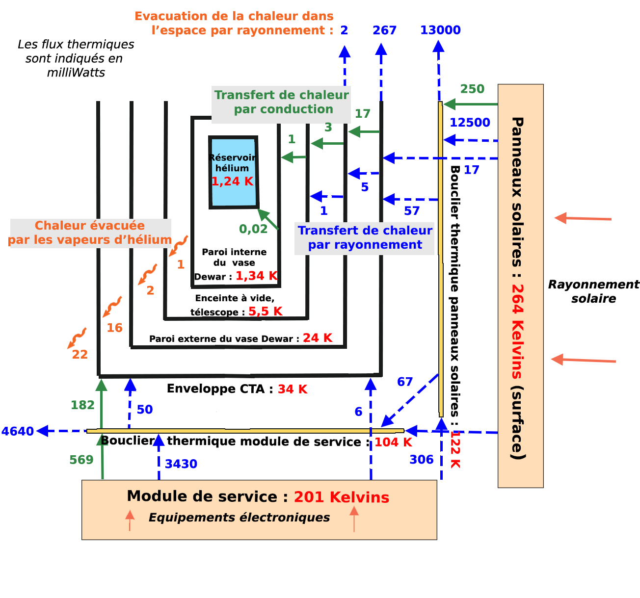 Modélisation des échanges thermiques du télescope spatial infrarouge Spitzer. La chaleur est produite par le rayonnement solaire qui vient frapper les panneaux solaires (à droite) et l'électronique du module de service en bas sur le schéma. Elle se diffuse vers le télescope et ses instruments par conduction (via les entretoises qui solidarisent les différents composants) et par rayonnement. Deux boucliers thermiques interceptent et évacuent dans le vide par rayonnement la majeure partie de la chaleur produite. La chaleur est progressivement bloquée par l'enveloppe externe et les enceintes du vase Dewar qui entourent le télescope et ses instruments. L'hélium en s'évaporant évacue le peu de chaleur (4 mW) qui parvient jusqu'au coeur du télescope maintenu à 5,5 Kelvin ou qui est produite par les détecteurs des instruments.